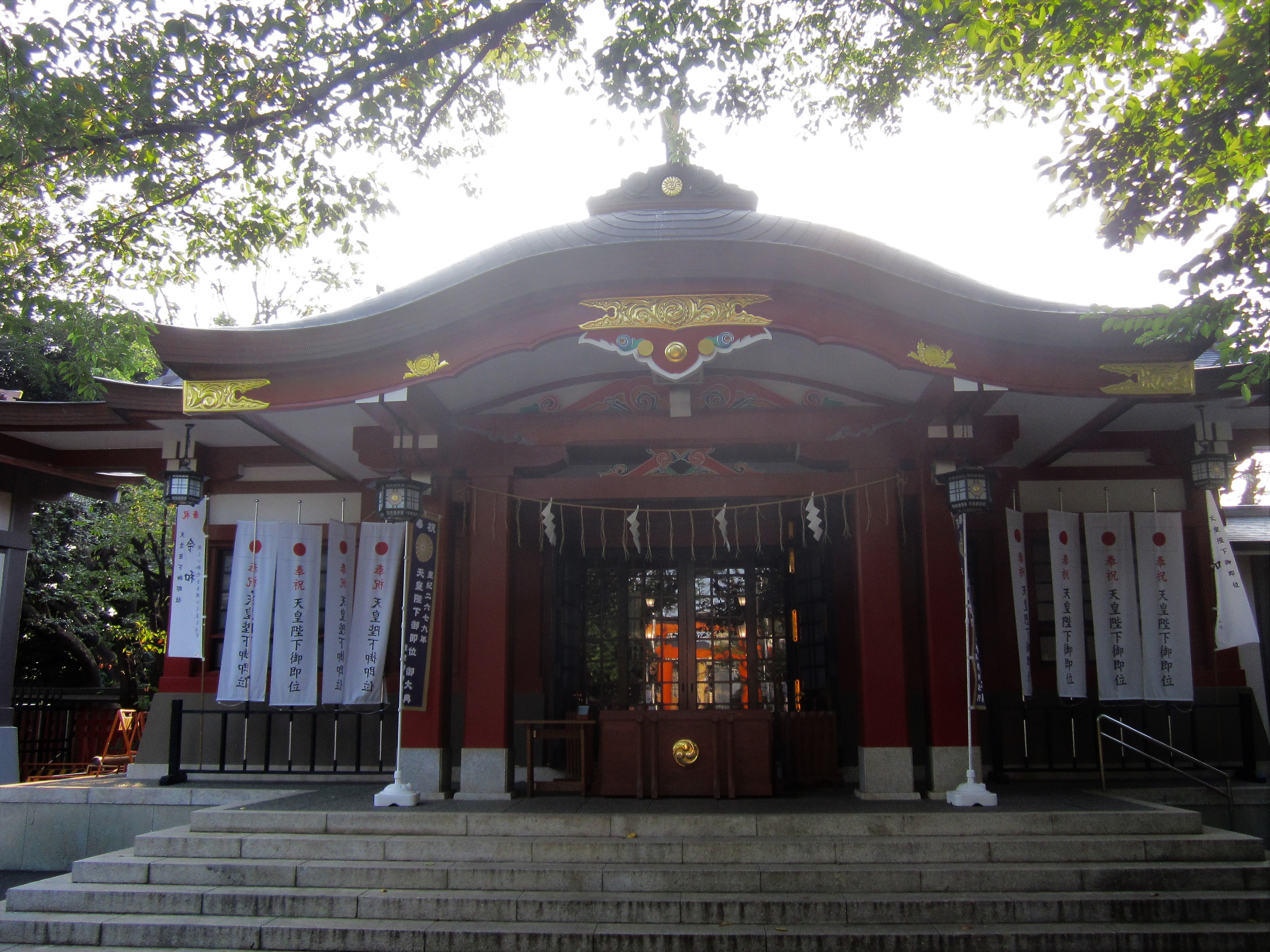 旗岡八幡神社